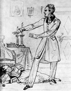 L'attore Vasilij A. Karatygin (1802-1853) nel ruolo di Arbenin (dall'opera teatrale di M. Ju. Lermontov Un ballo in maschera) in un disegno di Aleksandr P. Brjullov